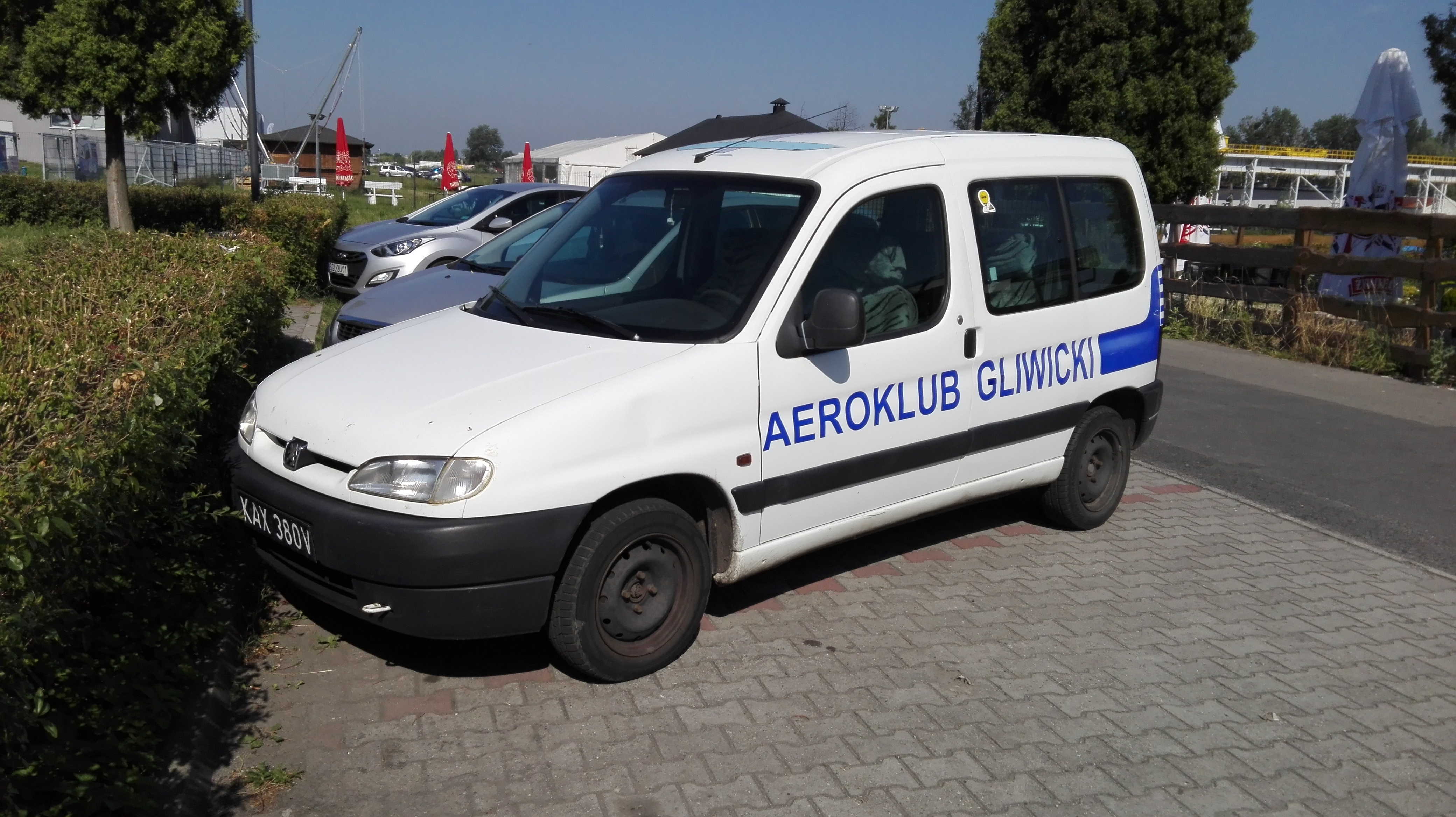 Peugeot Partner